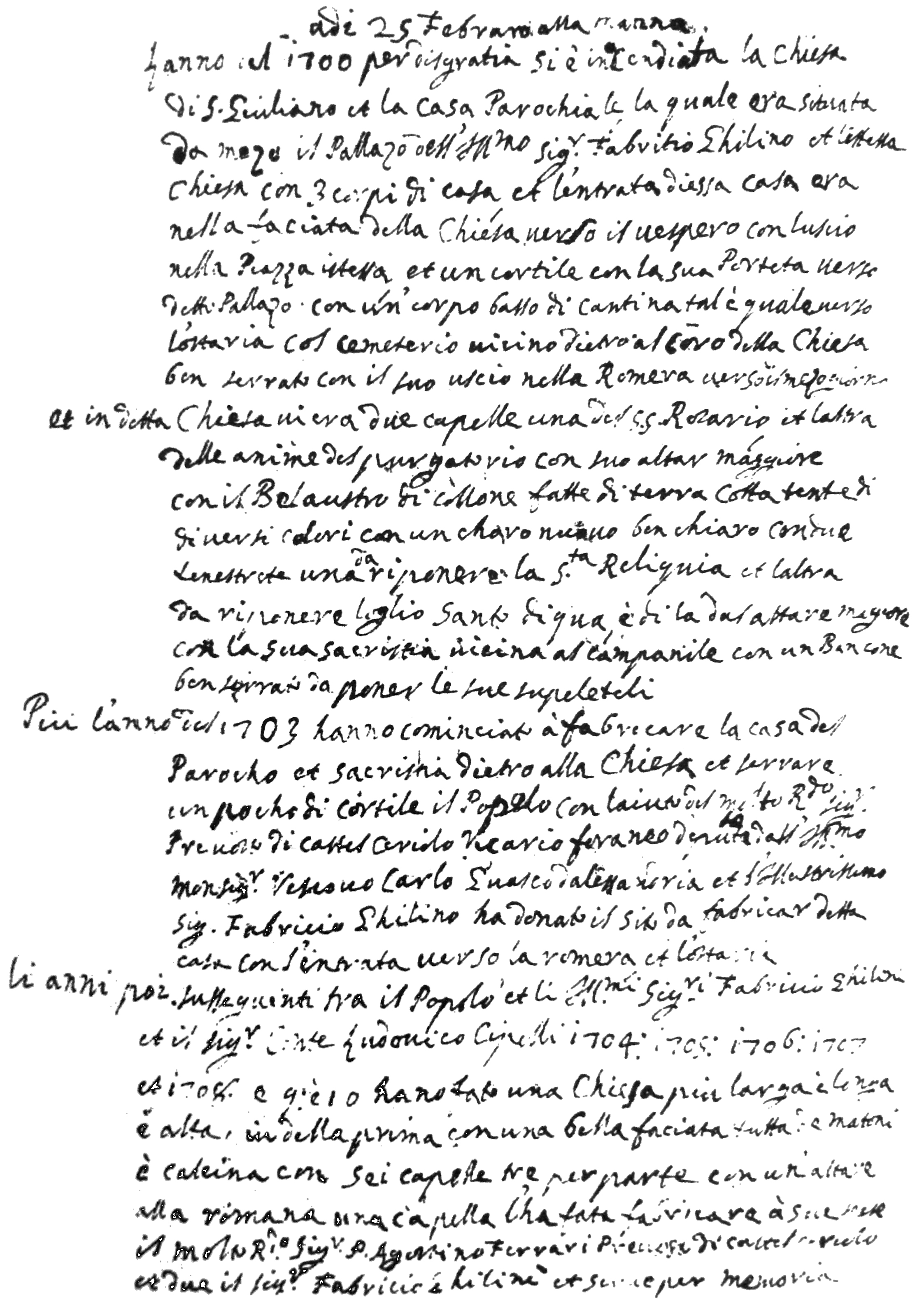 Copia del documento originale, conservato presso l'archivio parrocchiale di San Giuliano Nuovo (AL), circa l'incendio della chiesa di San Giuliano dell'anno 1700 e la successiva ricostruzione voluta da Fabrizio IV Ghilini.